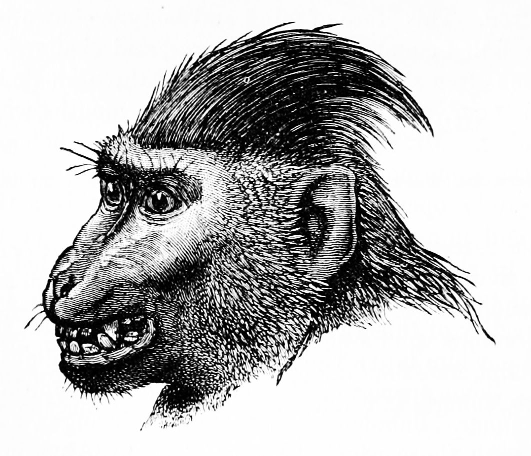 Pleased Celebes macaque